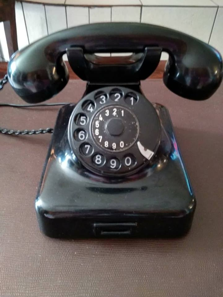 Old germany phone, when greece have junda